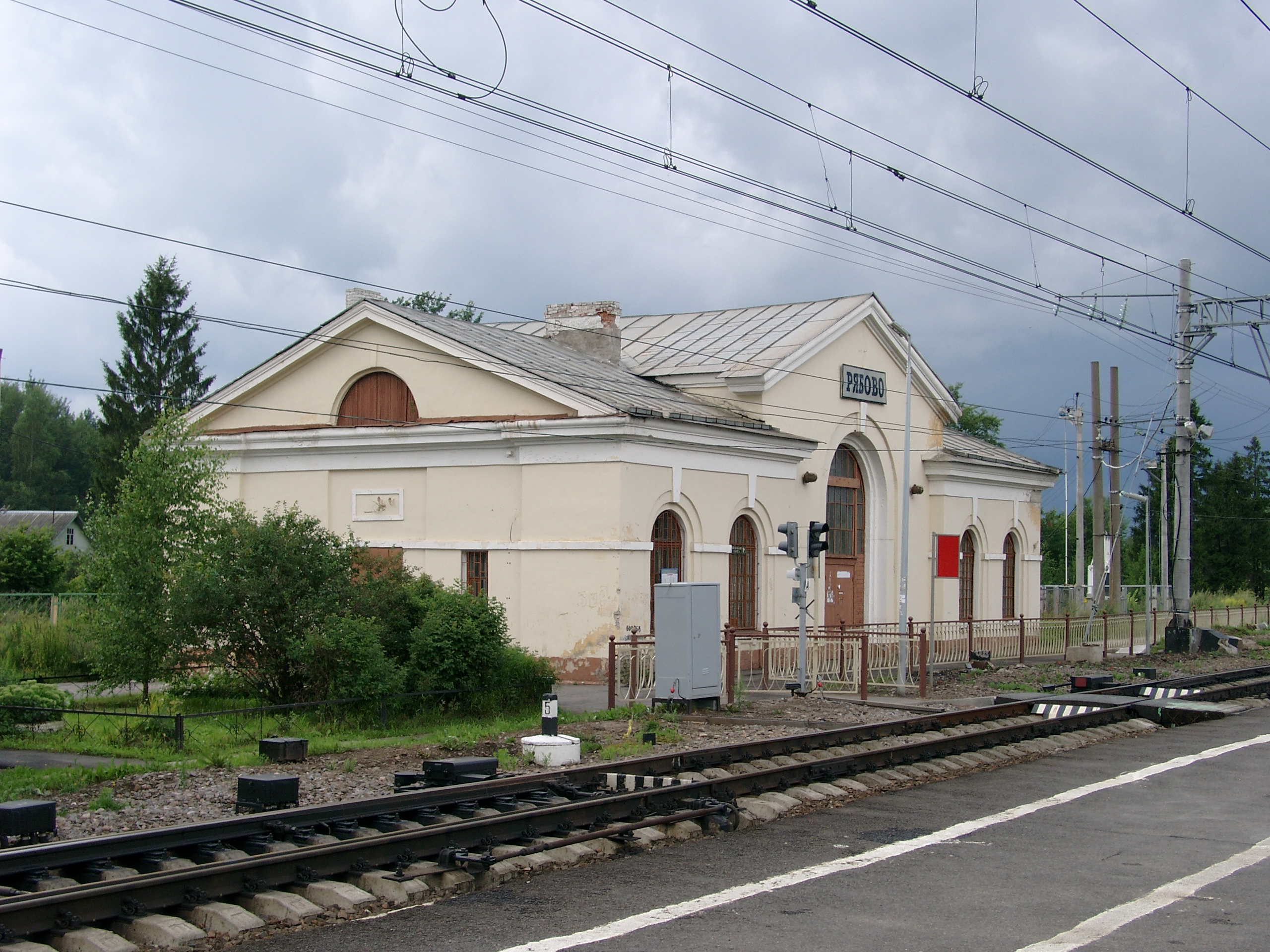 Железнодорожная станция Рябово, Ленинградская область, Россия.